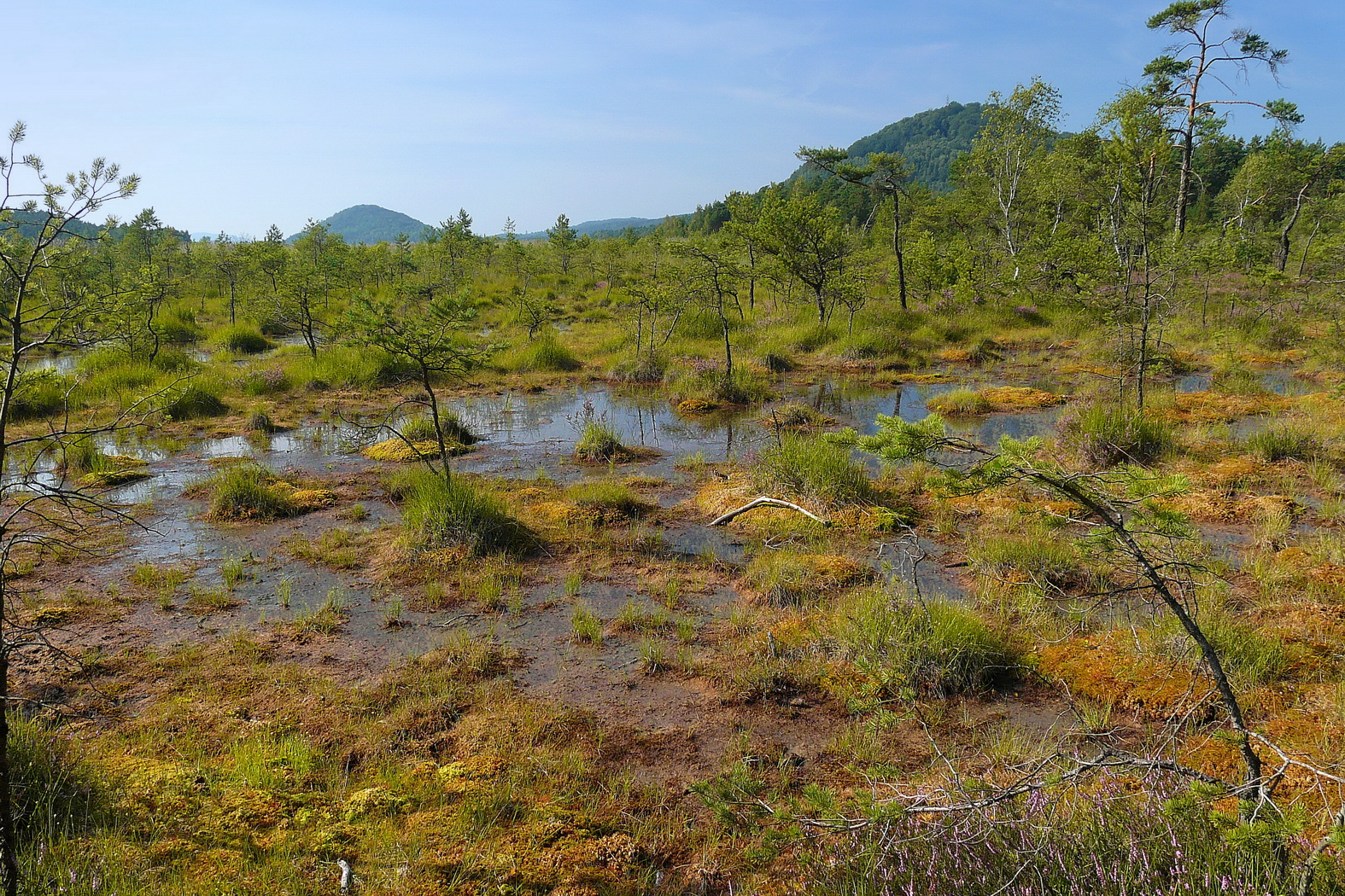 Šroubený a Borný nad NPP Swamp